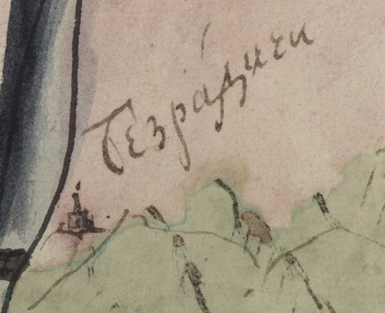 Фрагмент карти Київської губернії. XVIII століття. РГАДА, ф. 192, оп. 1, Киевская губ., № 5.